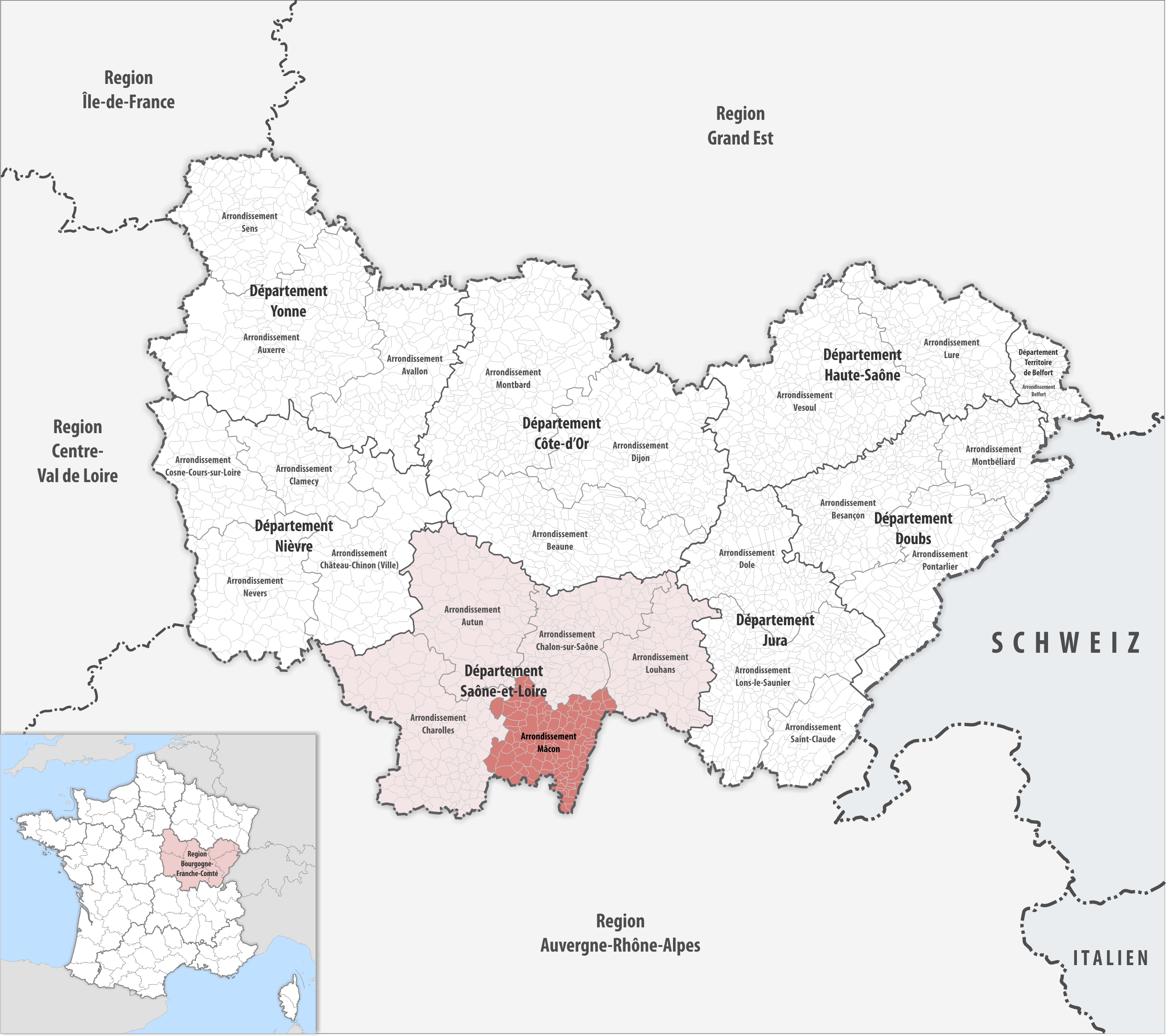 Lage des Arrondissements Mâcon